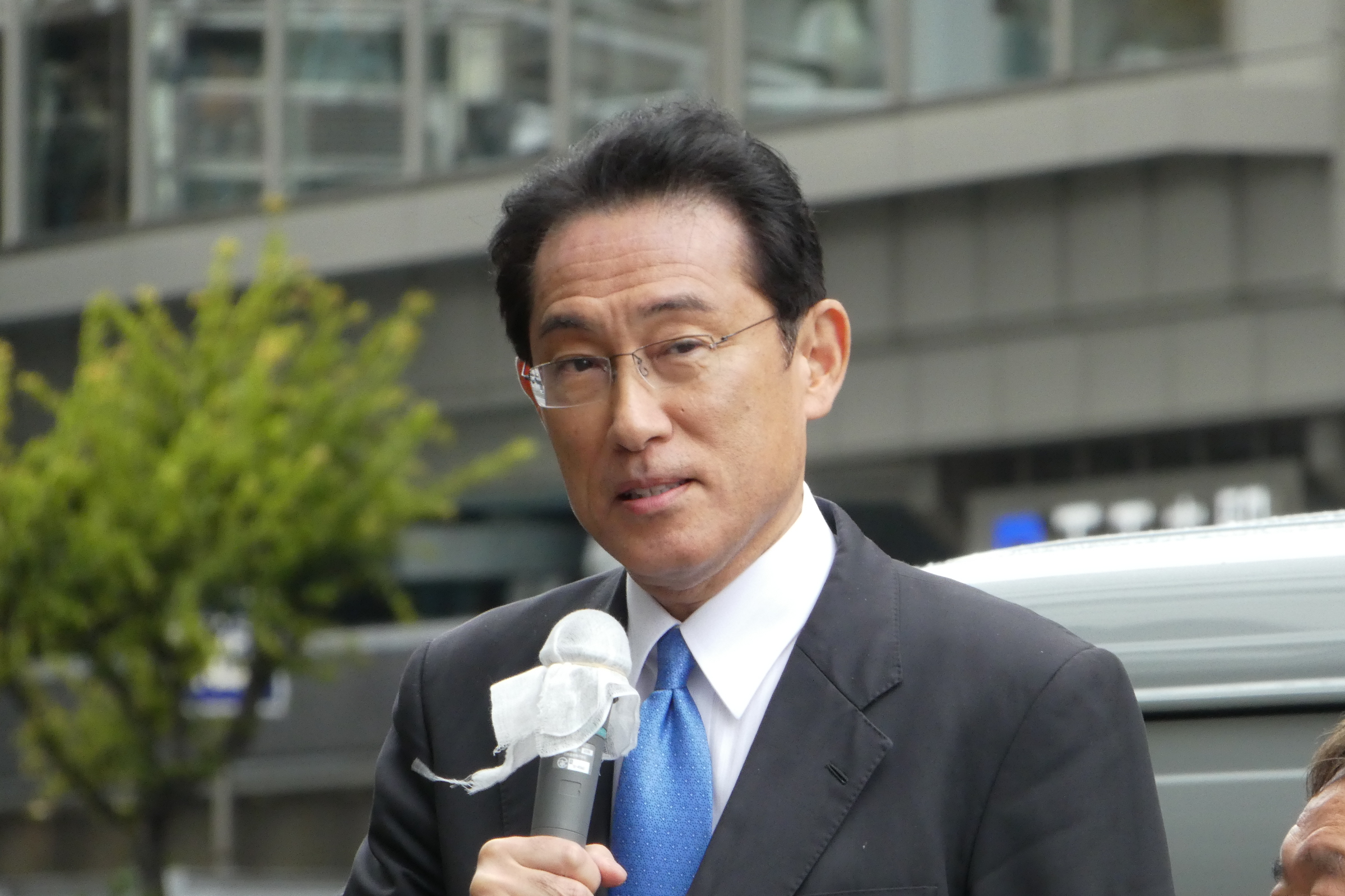 大阪市内で演説する岸田文雄。